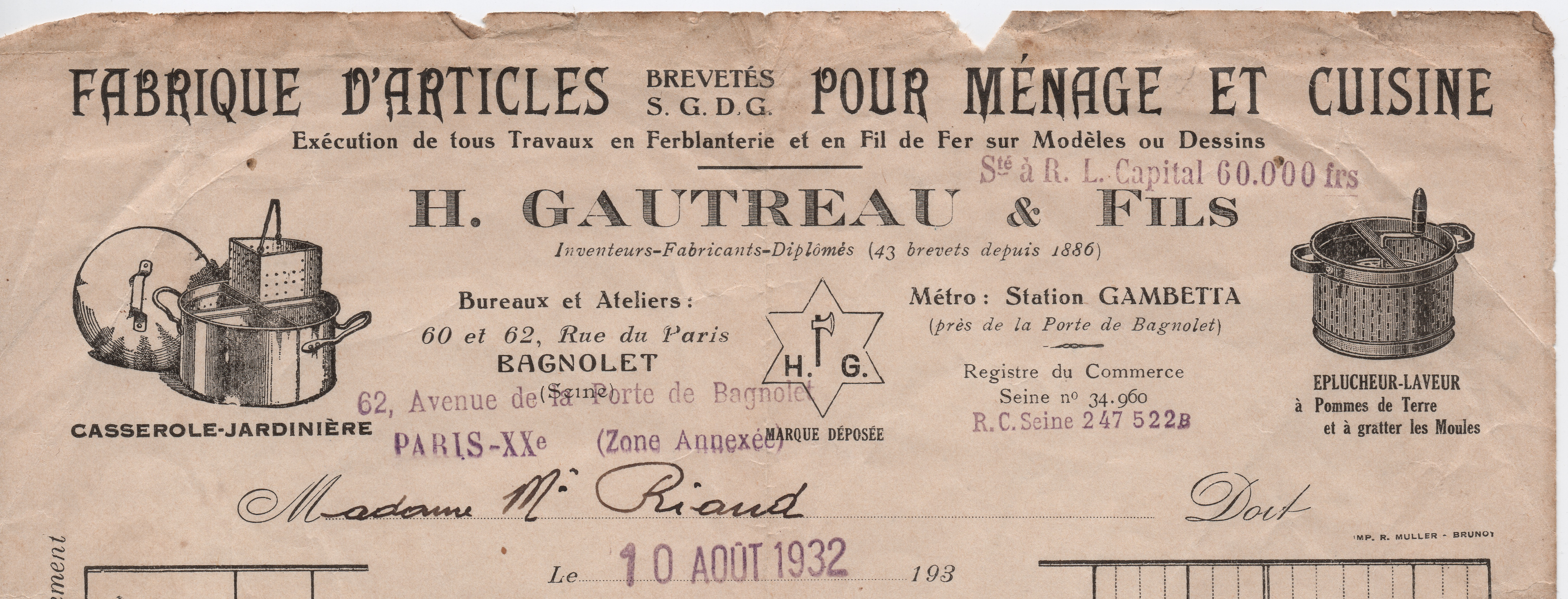 Extrait du catalogue H.G 1903. Le fourneau à alcool Le Volcan, mettant en ébullition 1 litre d'eau en 4 mn, obtient une médaille de bronze au concours de l'alcool 1902. En vente aux Galeries Lafayette et au Bon Marché de 1903 à 1911.